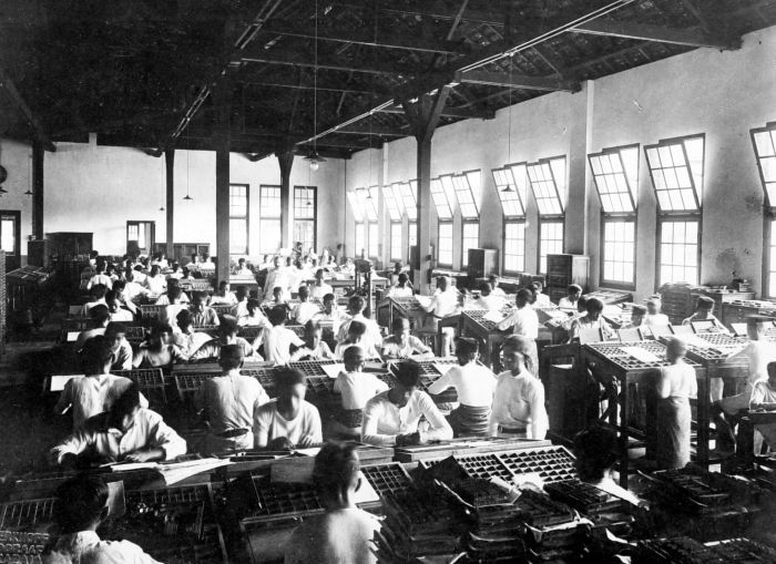 Repronegatief. Zetterij, Weltevreden